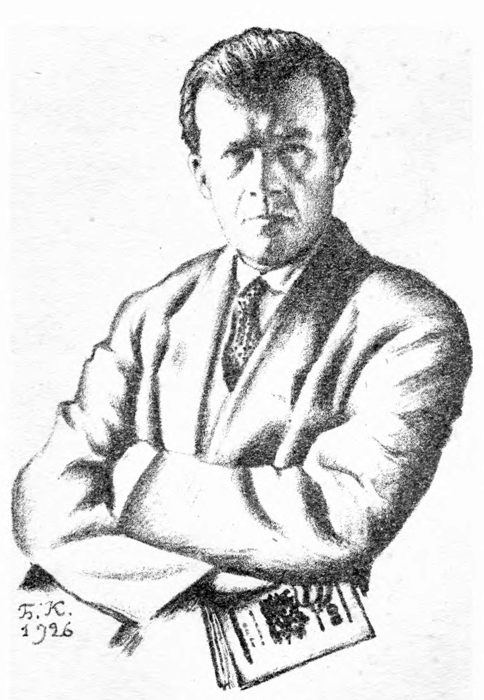 Карандашный портрет А. Неверова